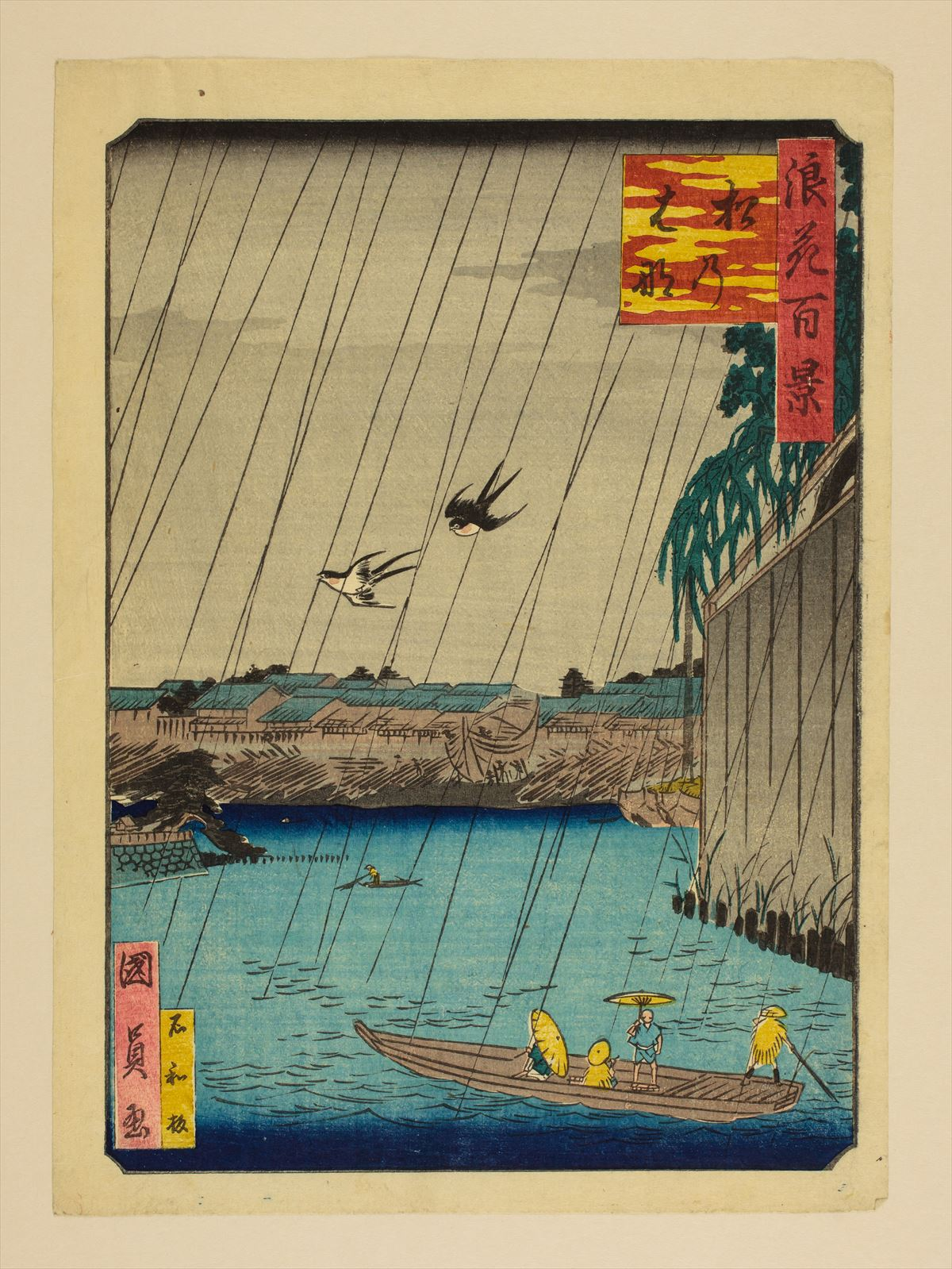 1800年代。歌川國員/画。浪花百景 102枚のうちの1枚。大阪市立中央図書館蔵。